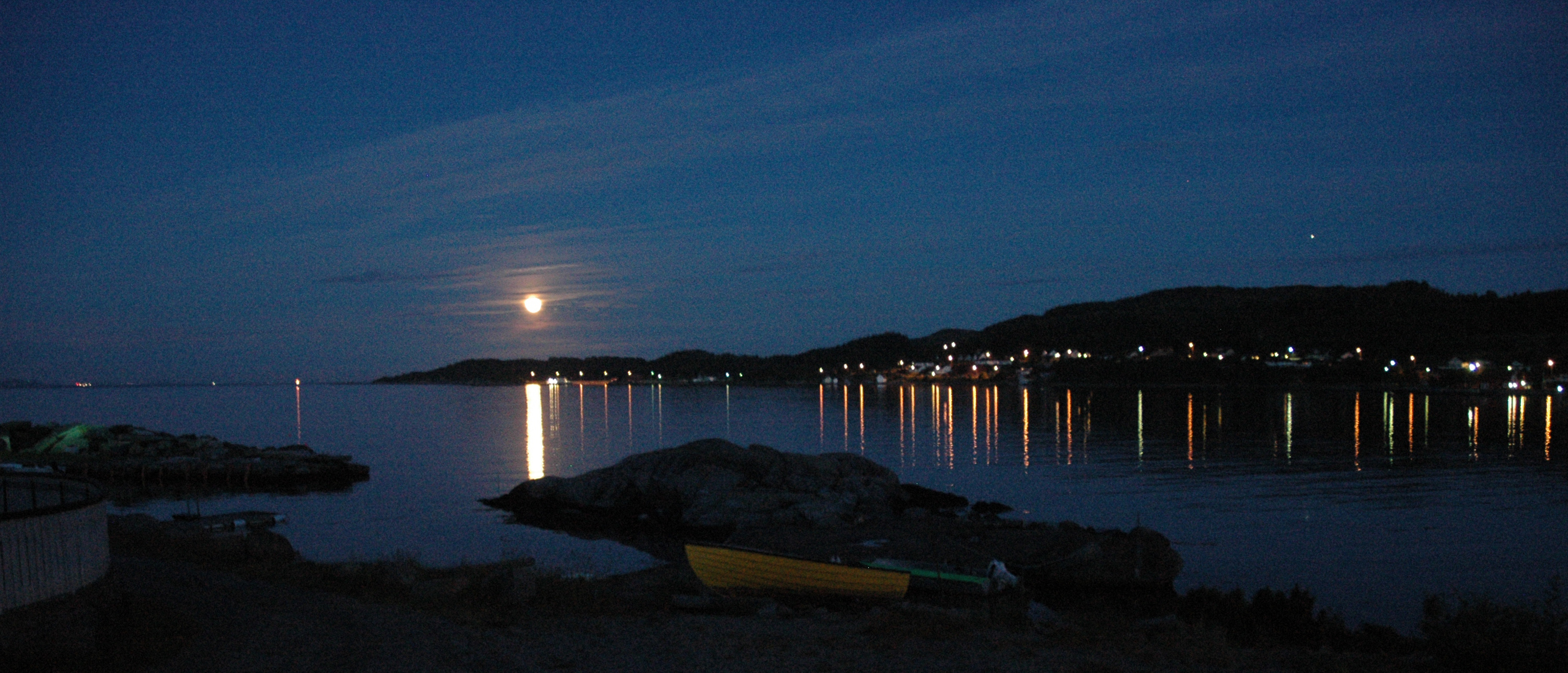 Moonlight